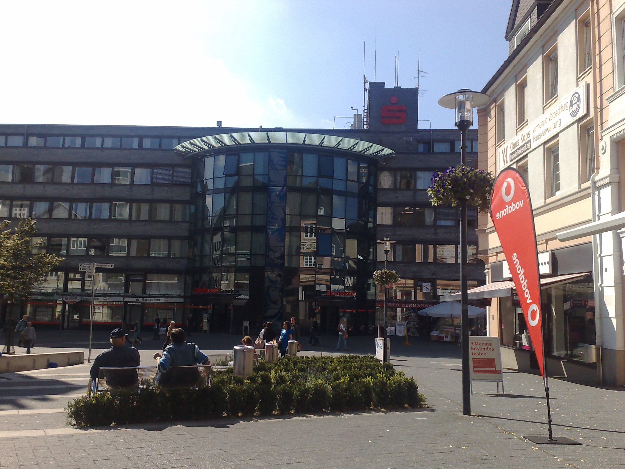 Sparkasse und Lindenplatz, Gummersbach